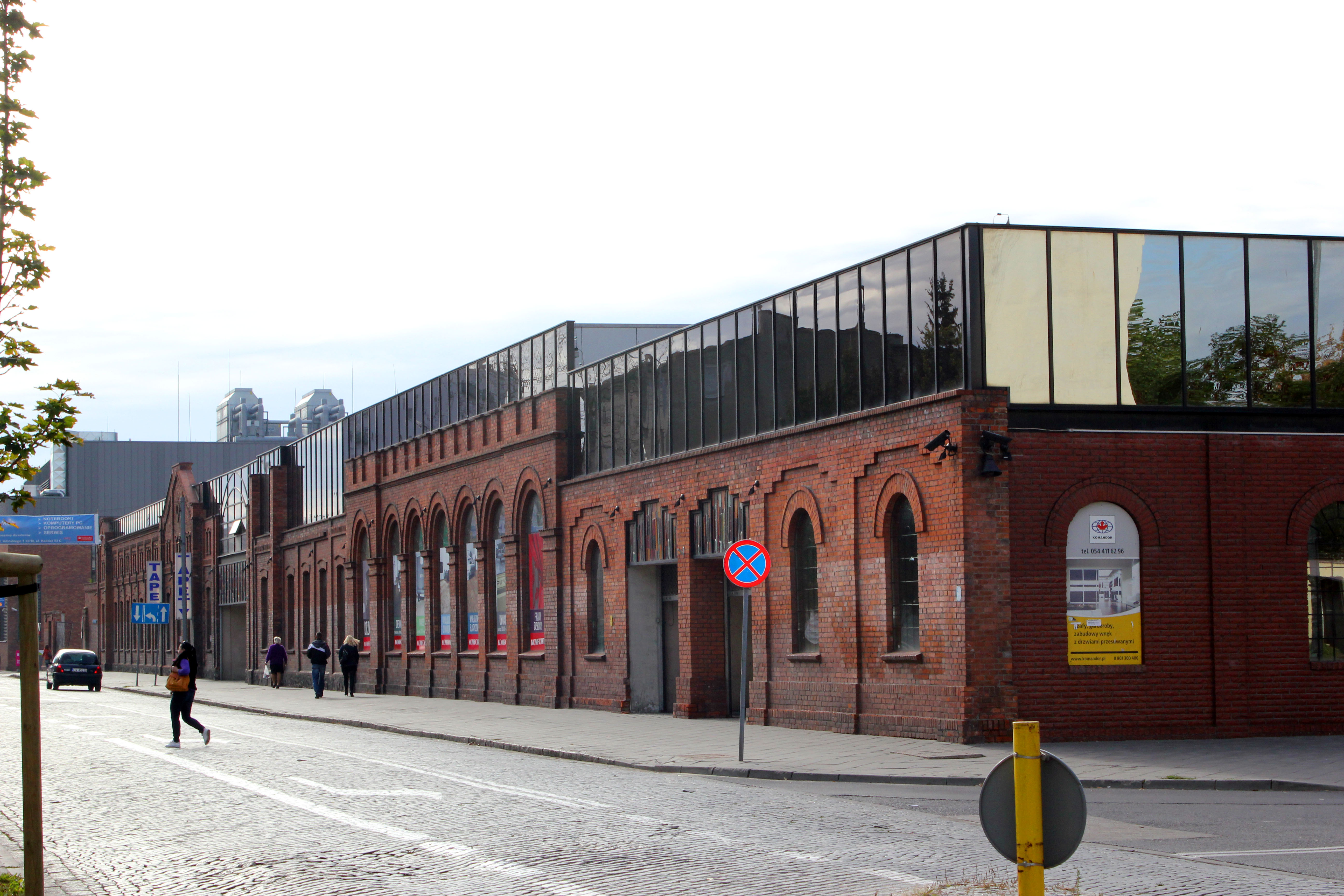 budynki fabryki maszyn, 1893: budynek odlewni; hala pras i blacharnia Włocławek, ul. Kilińskiego 5, miasto Włocławek